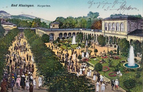 Der Bad Kissinger Kurgarten mit Arkadenbau um 1900